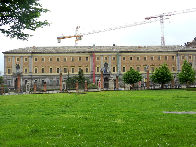 Torino - Galleria Sabauda (ospitata nella cosiddetta "manica nuova" di Palazzo Reale)